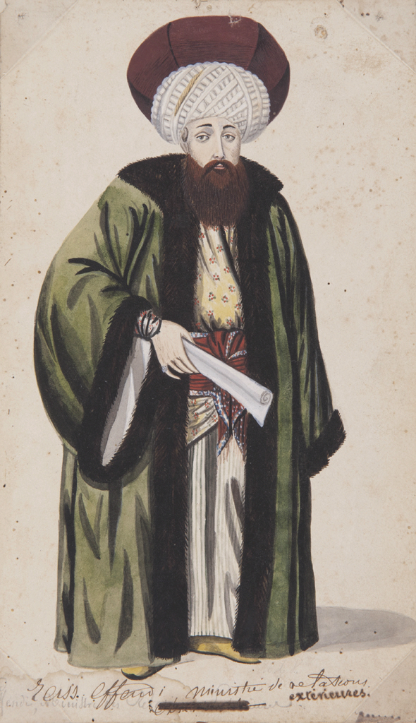 Reis Effendi ministre des relations extérieures, 19e siècle. Aquarelle sur papier collé sur papier. Hauteur de la feuille en mm 245 ; Largeur de la feuille en mm 145. Numéro d'inventaire : Bx M 1544. Mode d'acquisition Legs Bonie, 1895. (Musée des Beaux-Arts - Mairie de Bordeaux. Cliché DAVID, Florian).